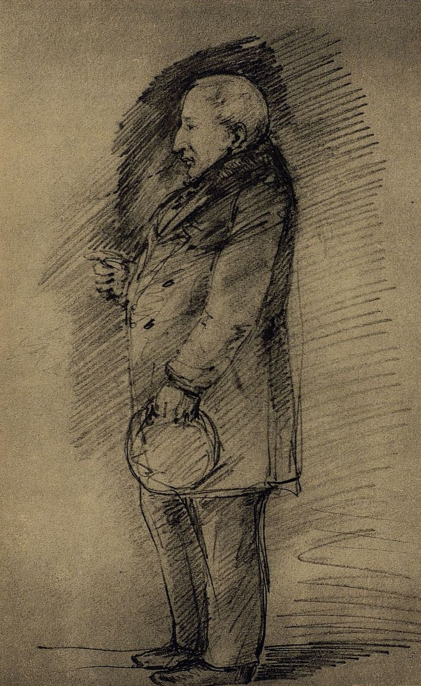 Снегирев Иван Михайлович